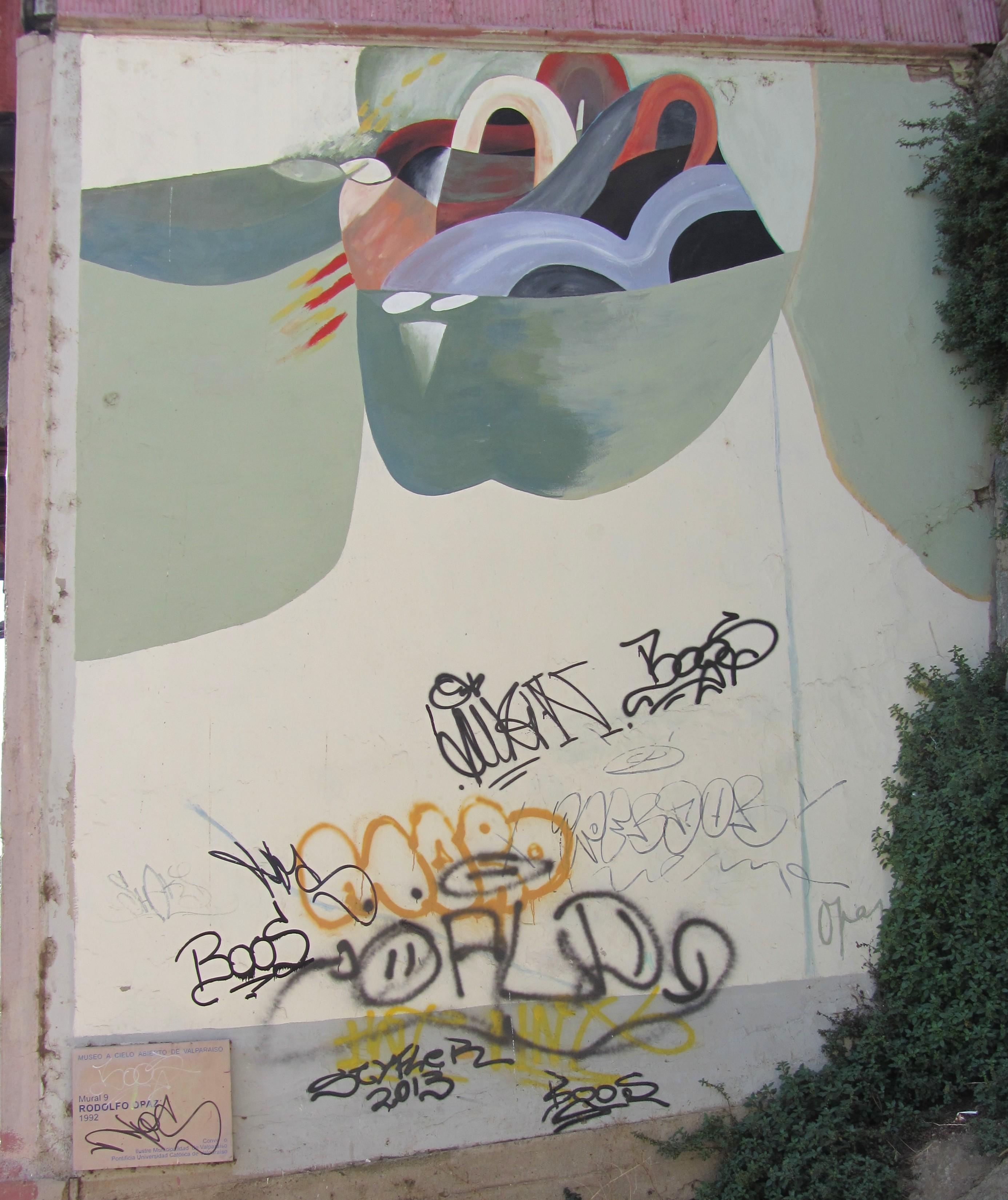 Mural nº9 del Museo a Cielo Abierto de Valparaíso, titulado El fantasma del ascensor, pintado en 1992 por Rodolfo Opazo